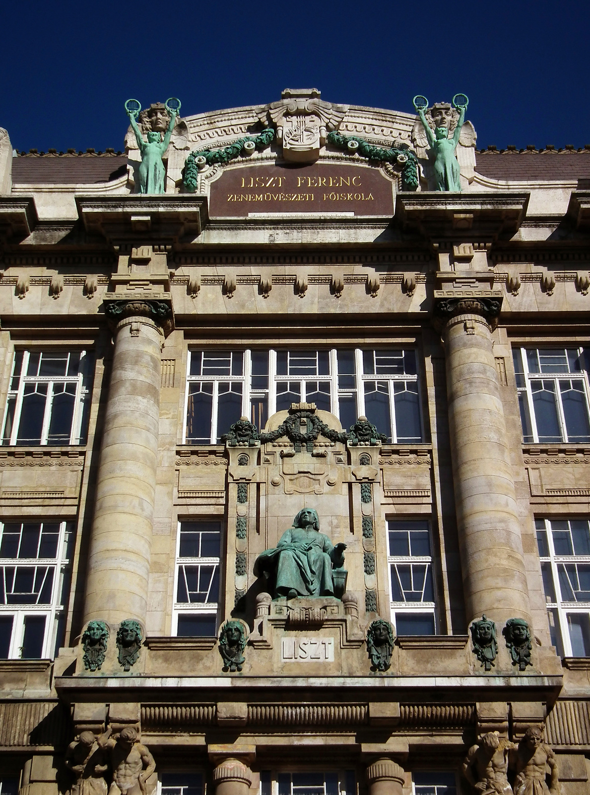 Zeneművészeti Főiskola (Budapest 6, Liszt Ferenc tér 8., Király utca 64., Dohnányi utca 1.) This is a photo of a monument in Hungary, Identifier: 755